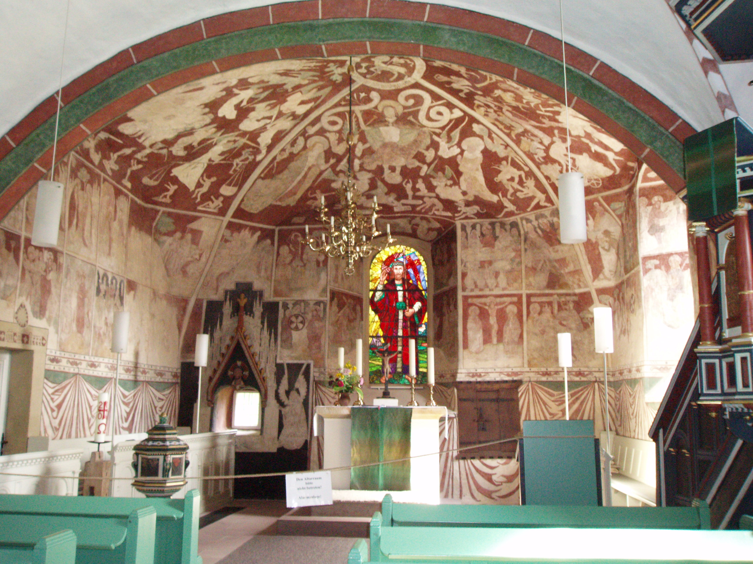 Großenwieden, St. matthaei, freskengeschmückter Chorraumm.jpg